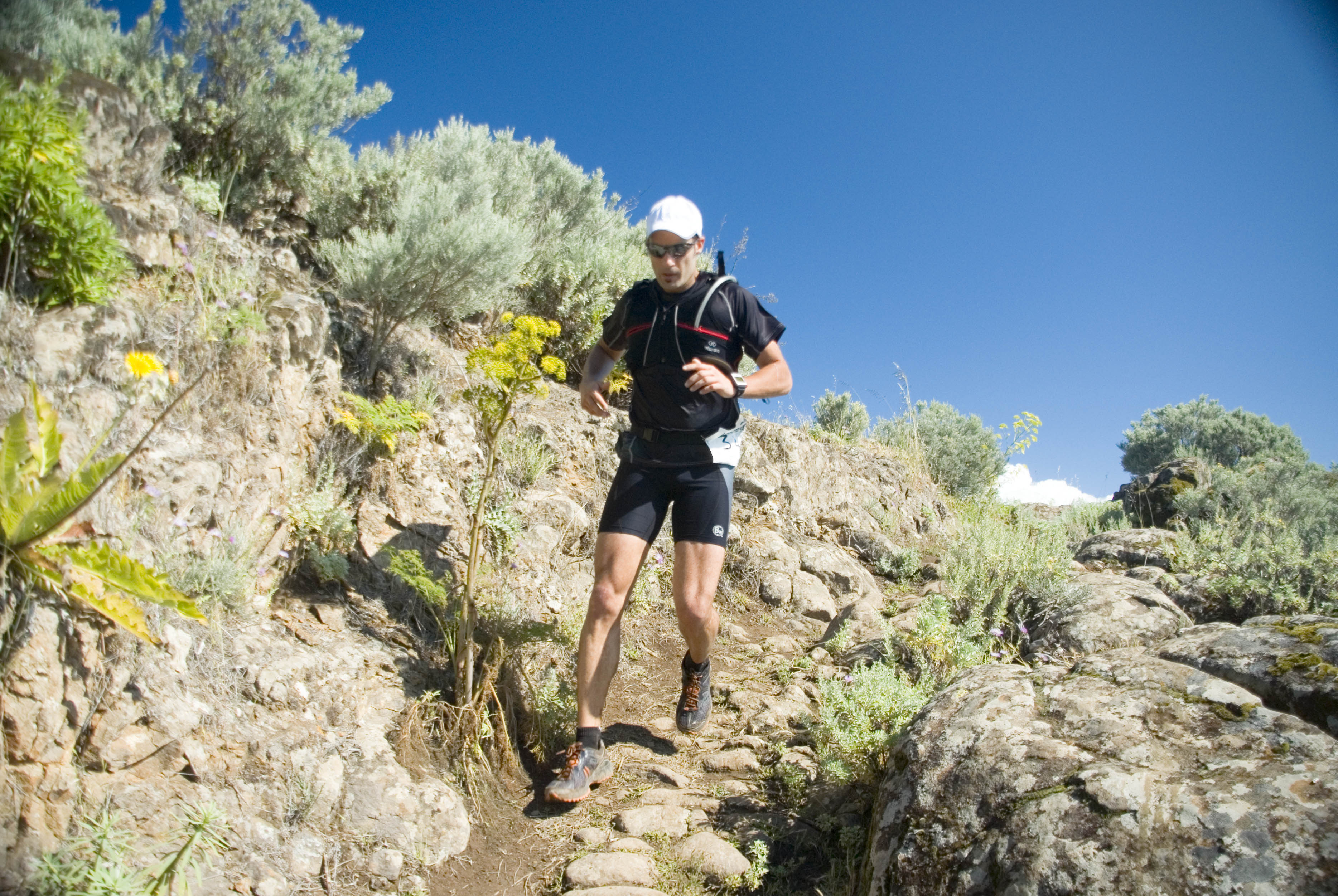 carrera Arretranco 2011